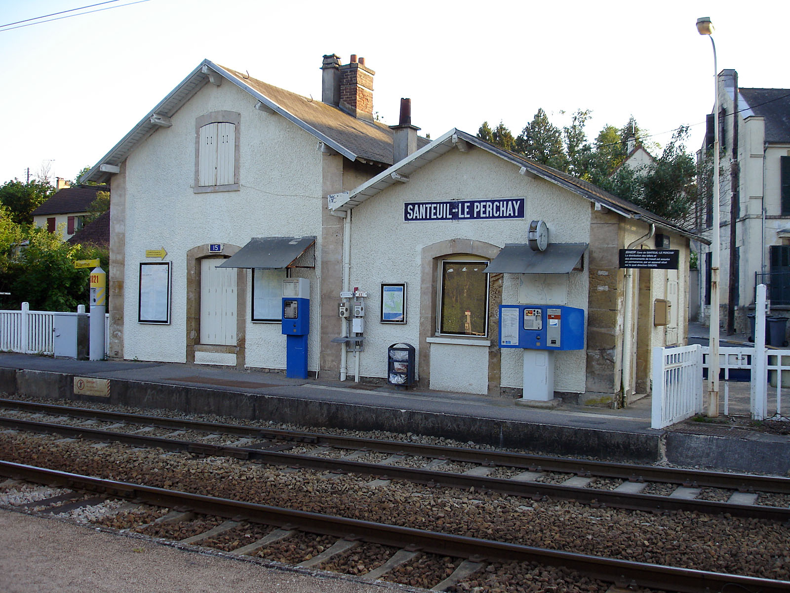 La gare de Santeuil - Le Perchay, Val-d'Oise, France.